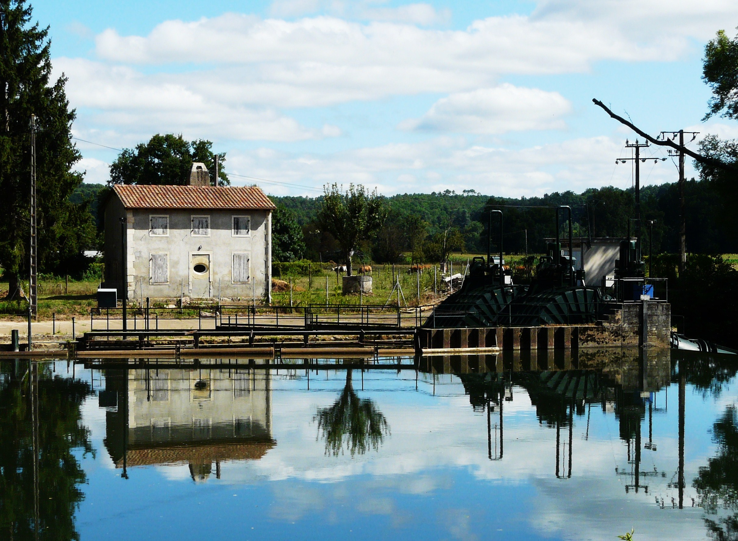 Micro-centrale hydraulique de Coly-Lamelette sur l'Isle à Sourzac, Dordogne, France.